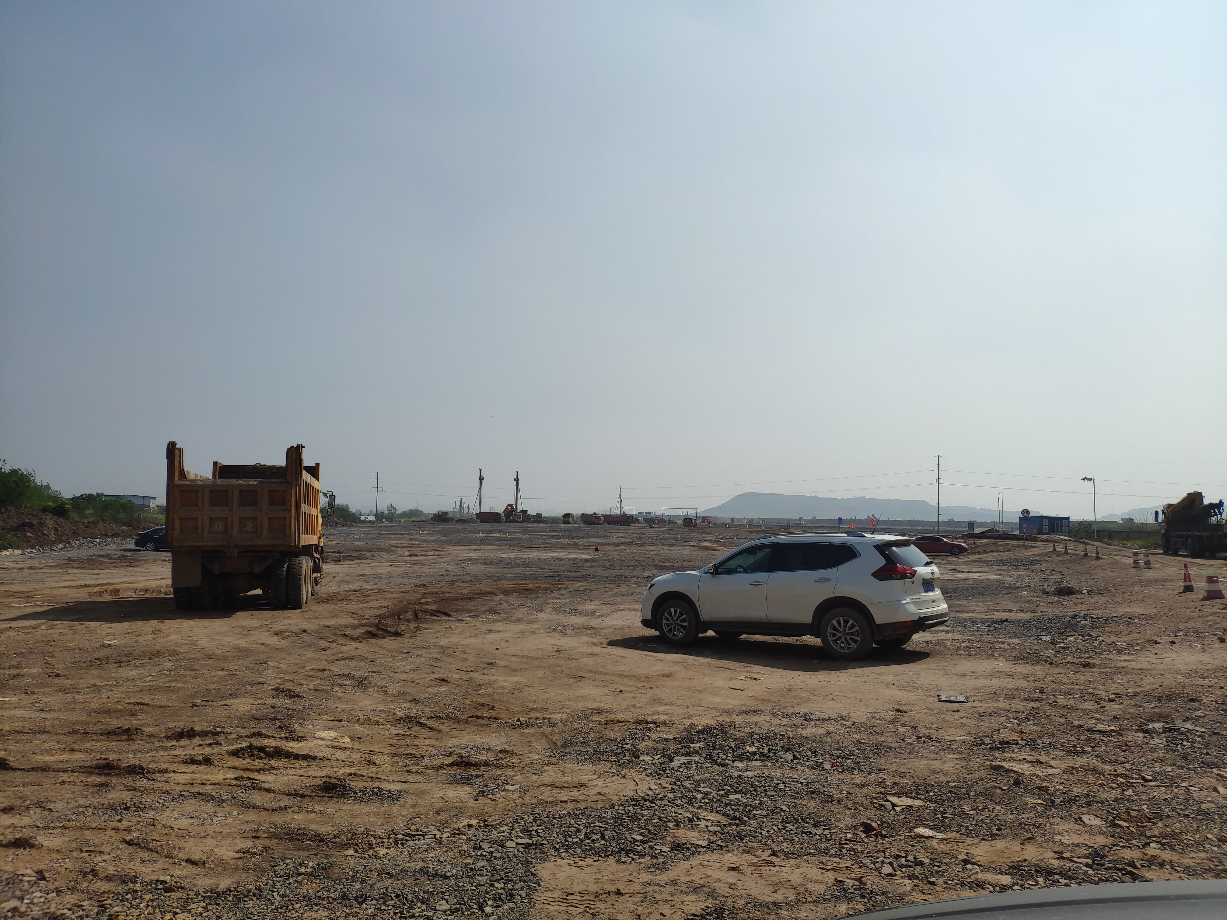 中文（中国大陆）: 鄂州机场建设工地